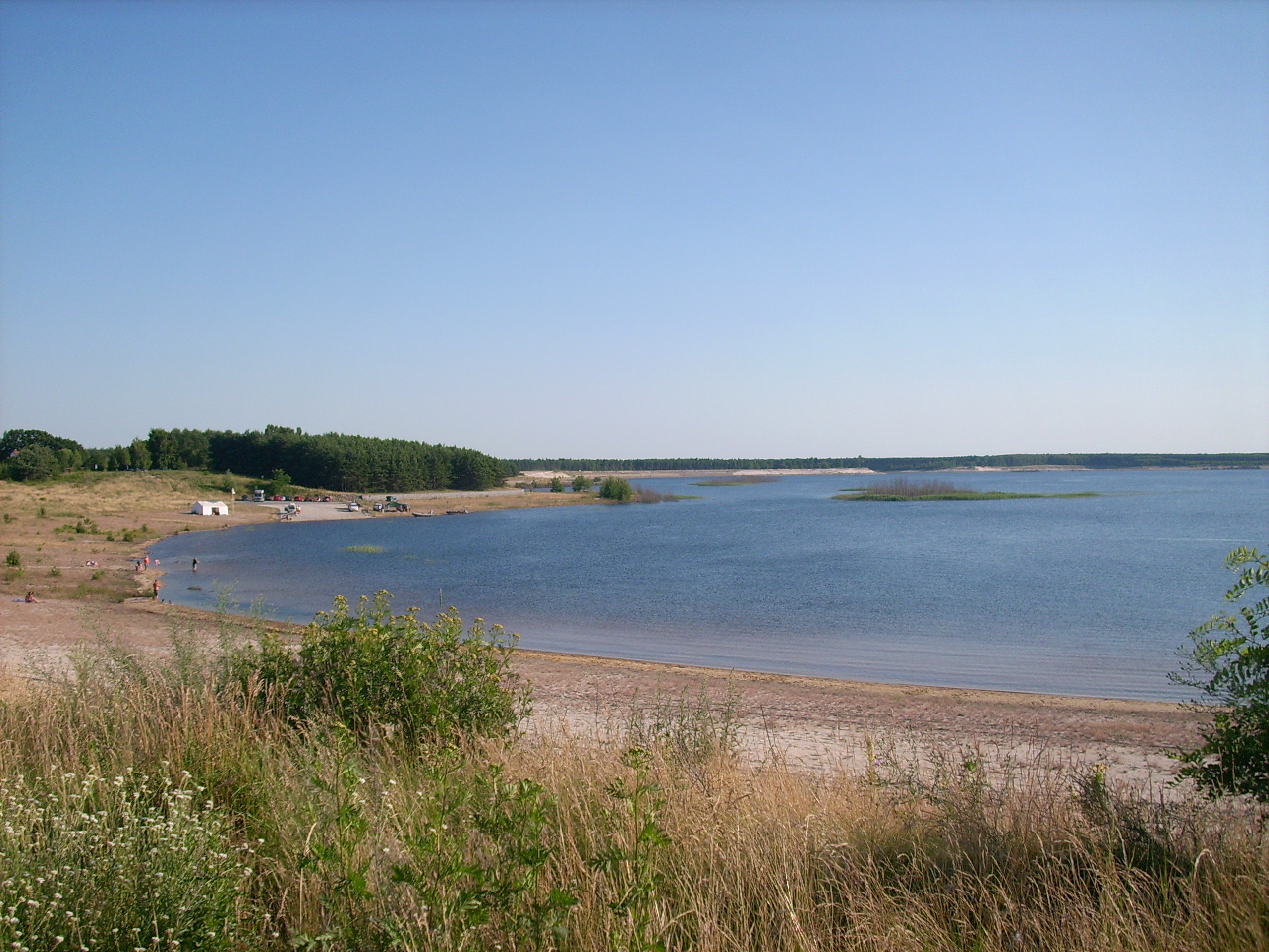 Partwitzer See im Lausitzer Seenland Hornjoserbsce: Parcowski jězor we Łužiskej jězorinje